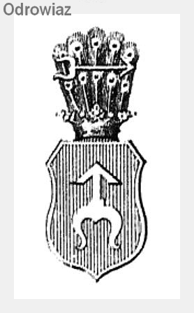 изображение польского дворянского герба Одровонж